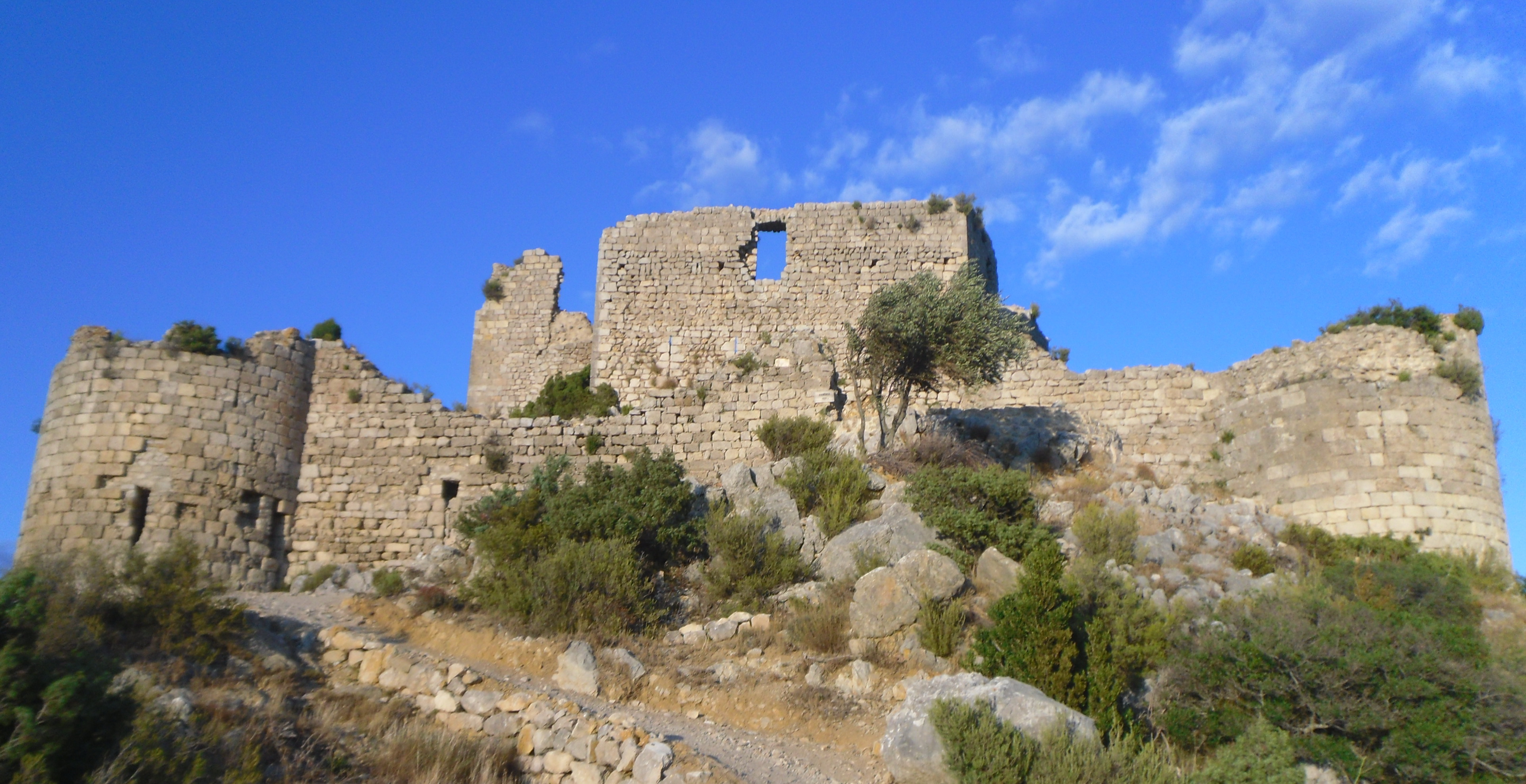 Fort d'Aguilar à Tuchan (Aude)